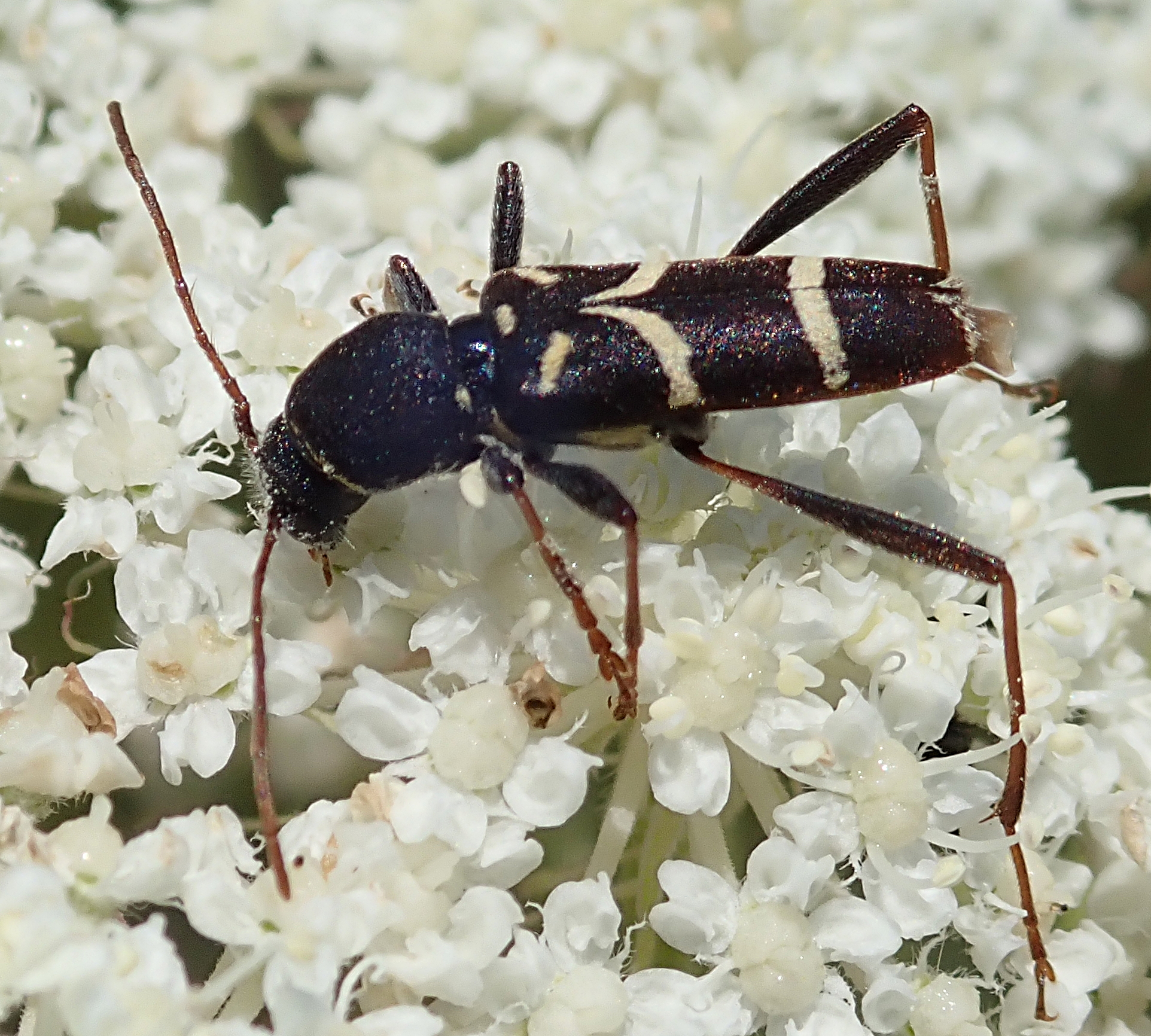 Clytus lama von Süddeutschland, Schwäbische Alb